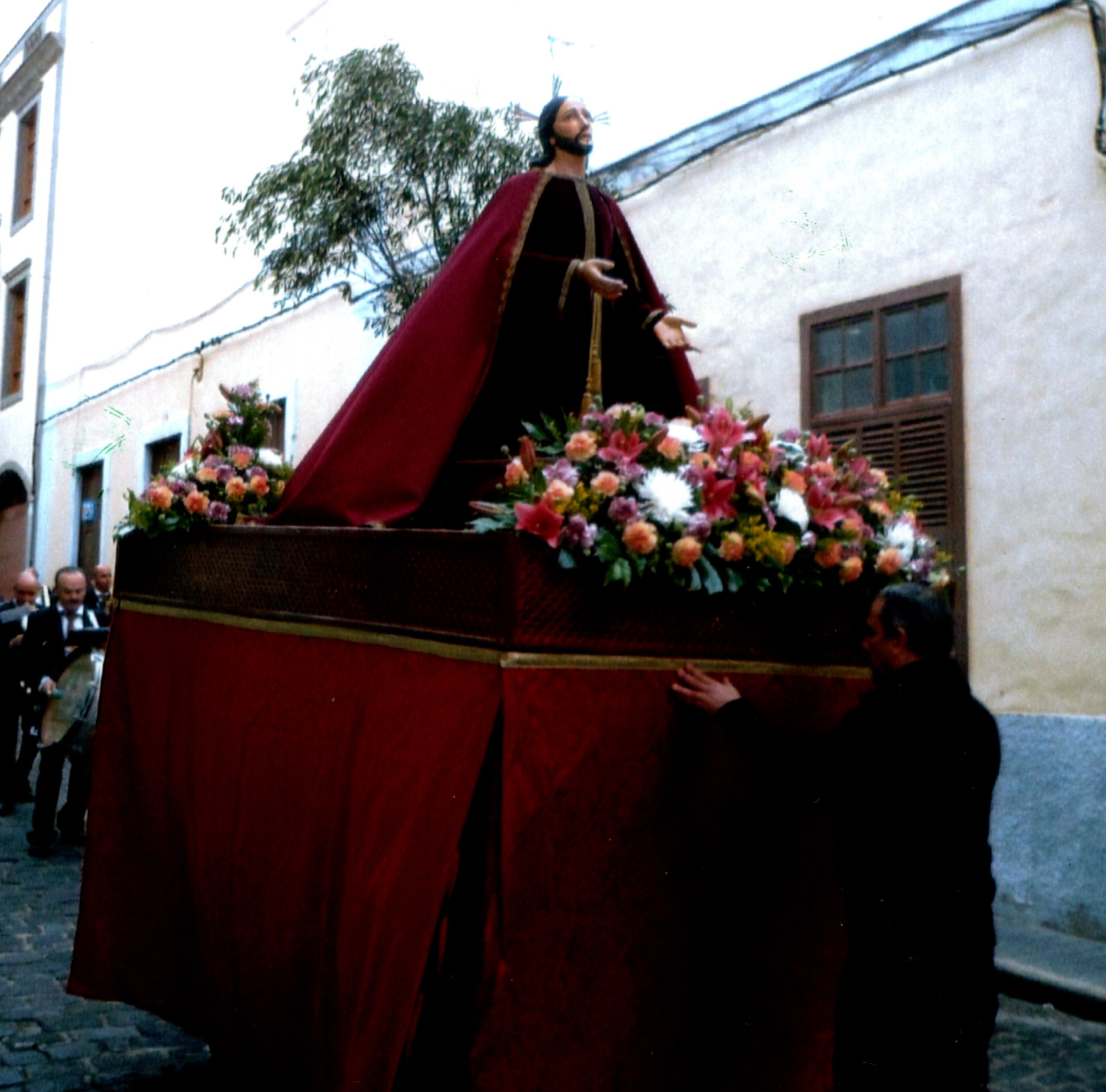 Oracion en El Huerto